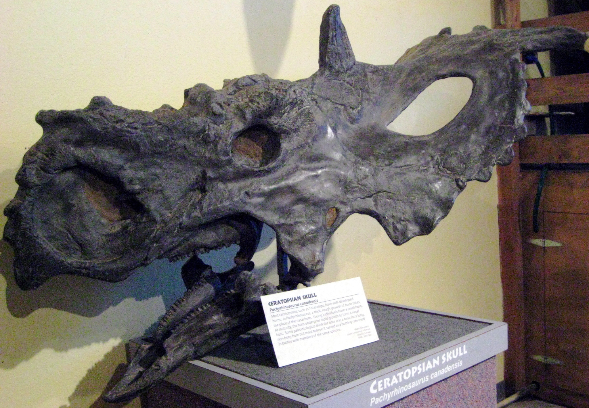 Pachyrhinosaurus lakustai skull